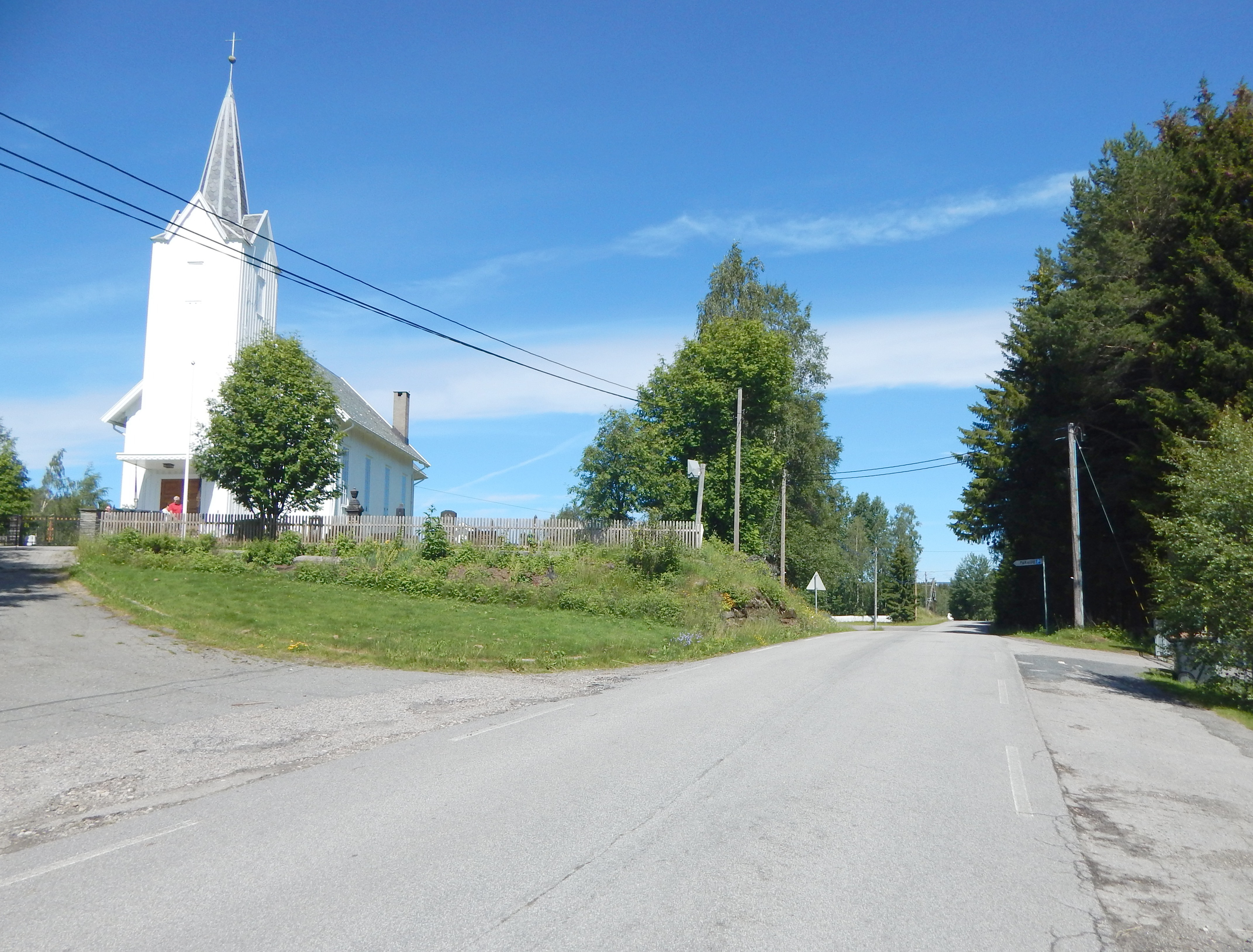 Nordskogbygdvegen ved Nordskogbygda kirke